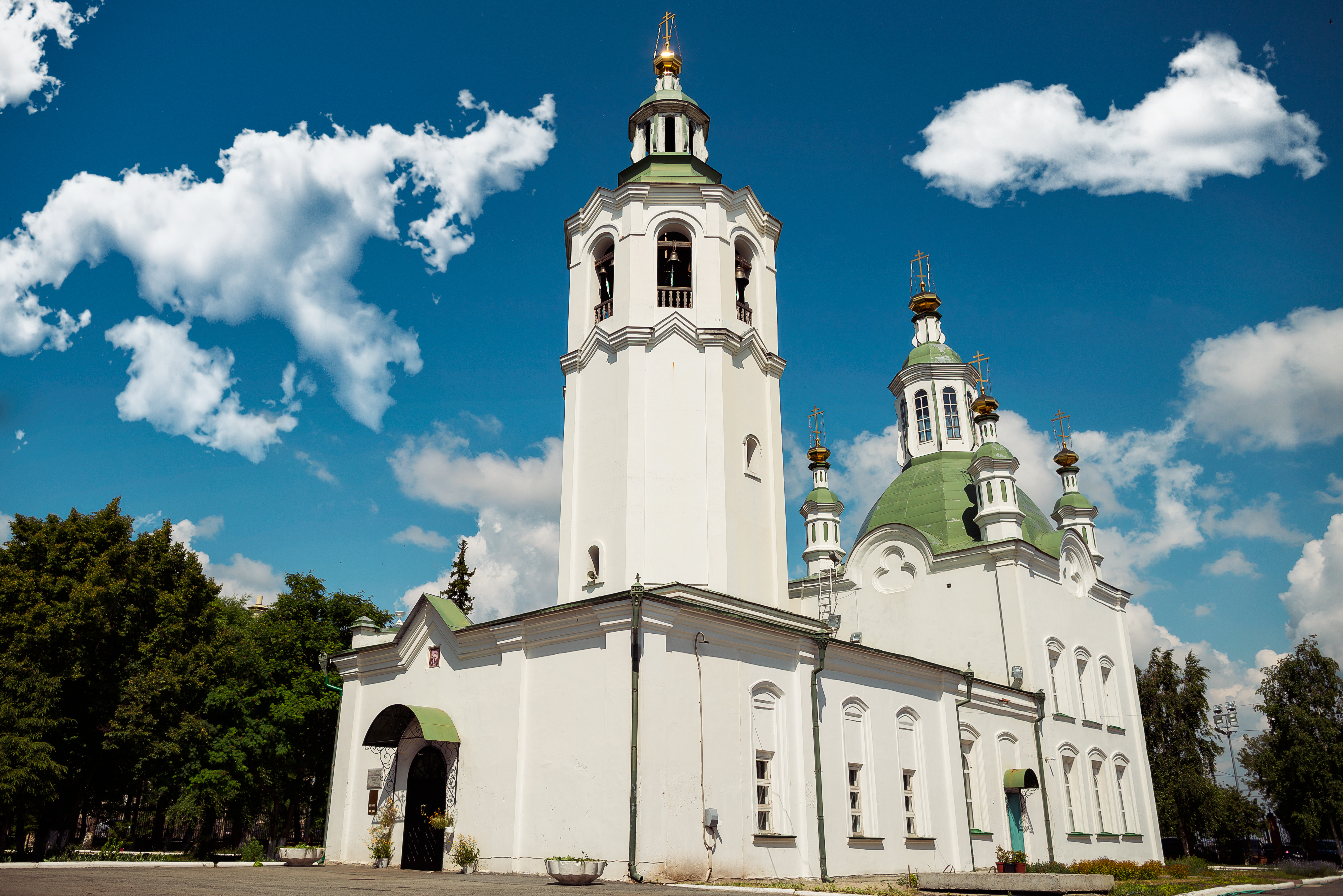 Никольская (Крестовоздвиженская) церковь (Тюменская область, Тюмень, Луначарского улица, 1)